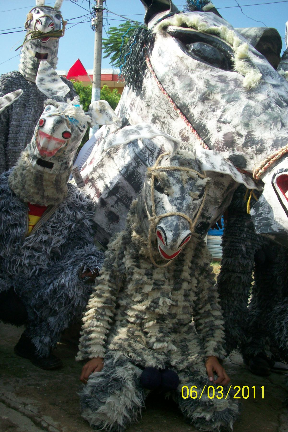 El Burro Corcoveón, detalle de las máscaras, creación de Adolfredo Llanos De la Asunción, director de la agrupación